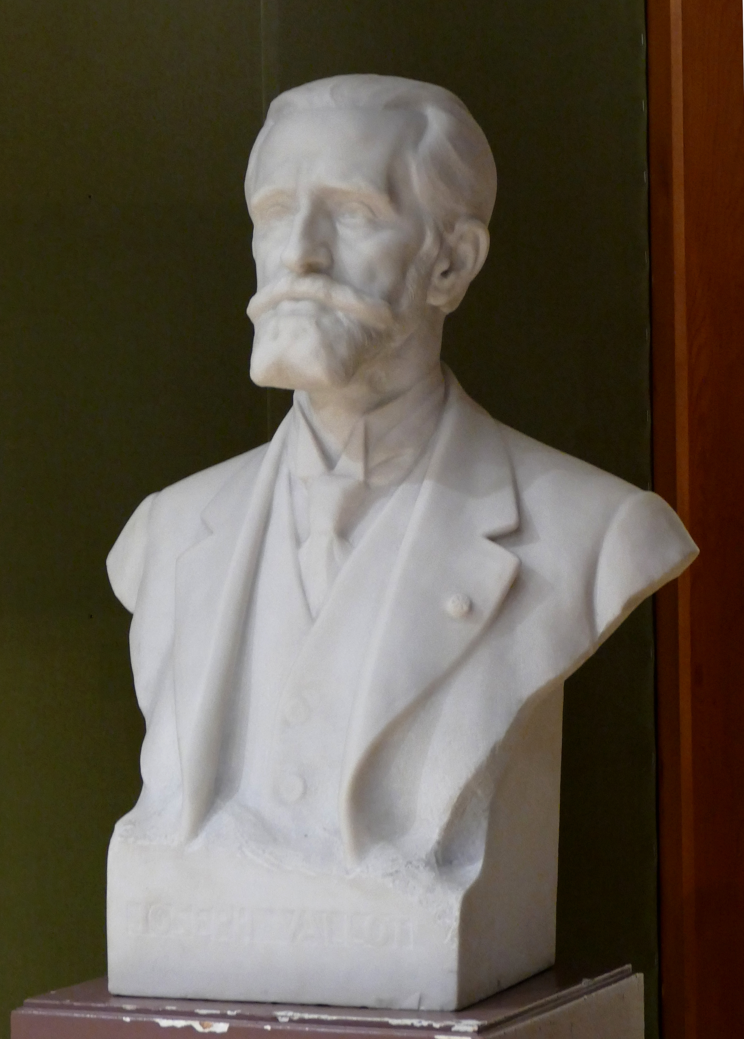 Buste en marbre de Joseph Vallot (1854-1925) par Henri Coutheillas. Musée Alpin de Chamonix.